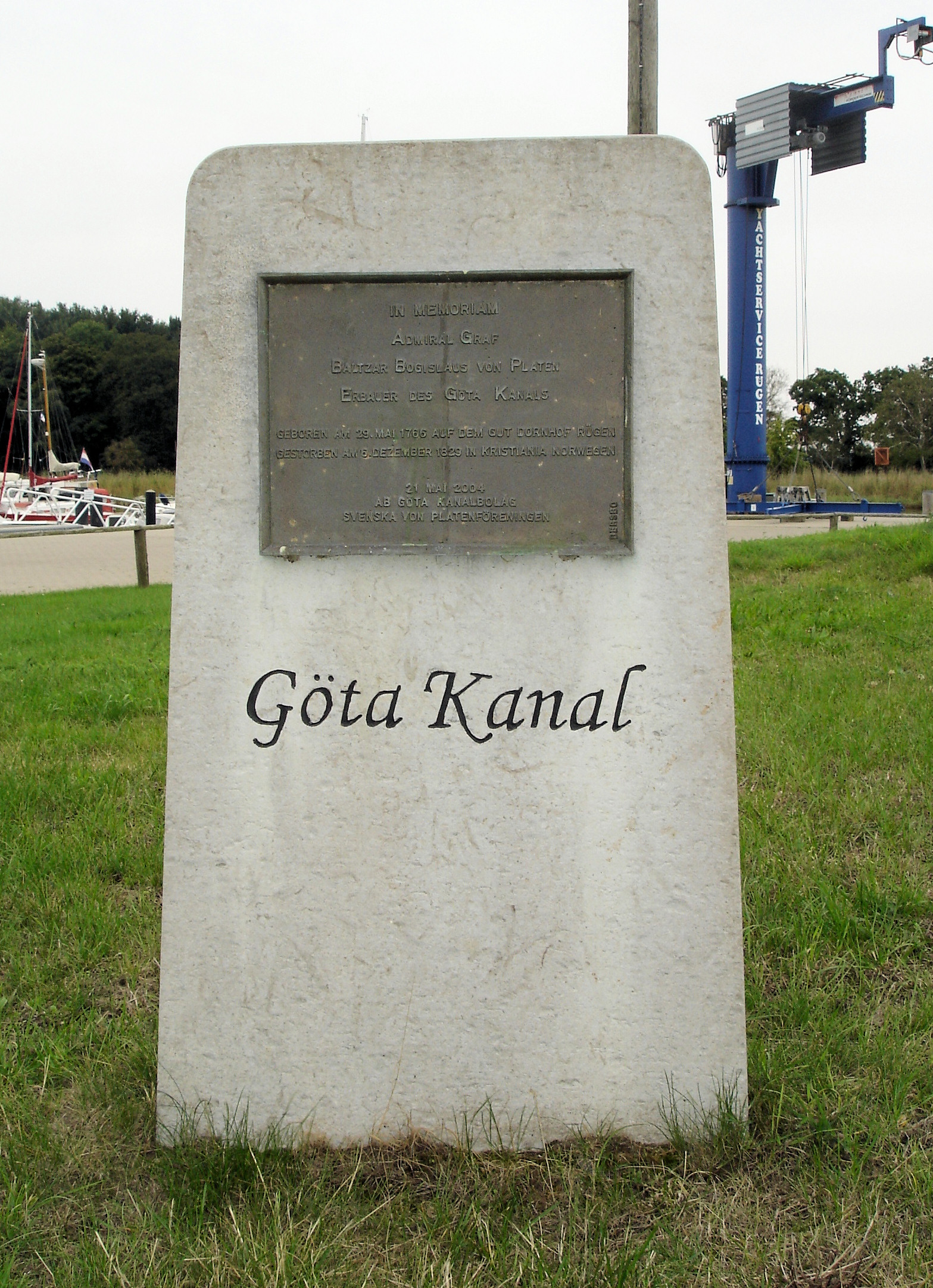 Gedenkstein für Balzar von Platen in Schaprode auf Rügen